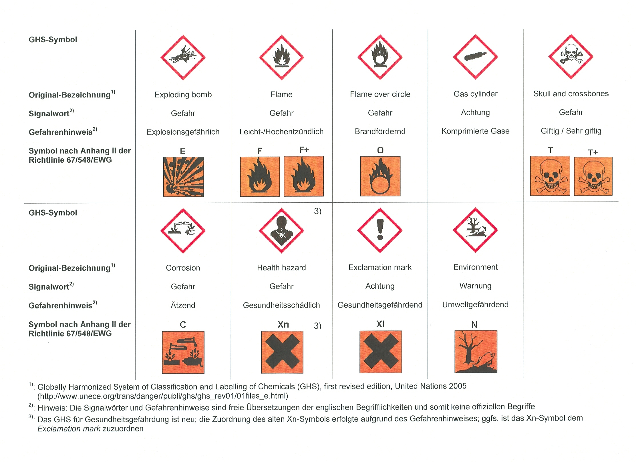 Gefahrstoffsymbole im neuen Global Harmonisierten System zu Kennzeichnung von Dateien